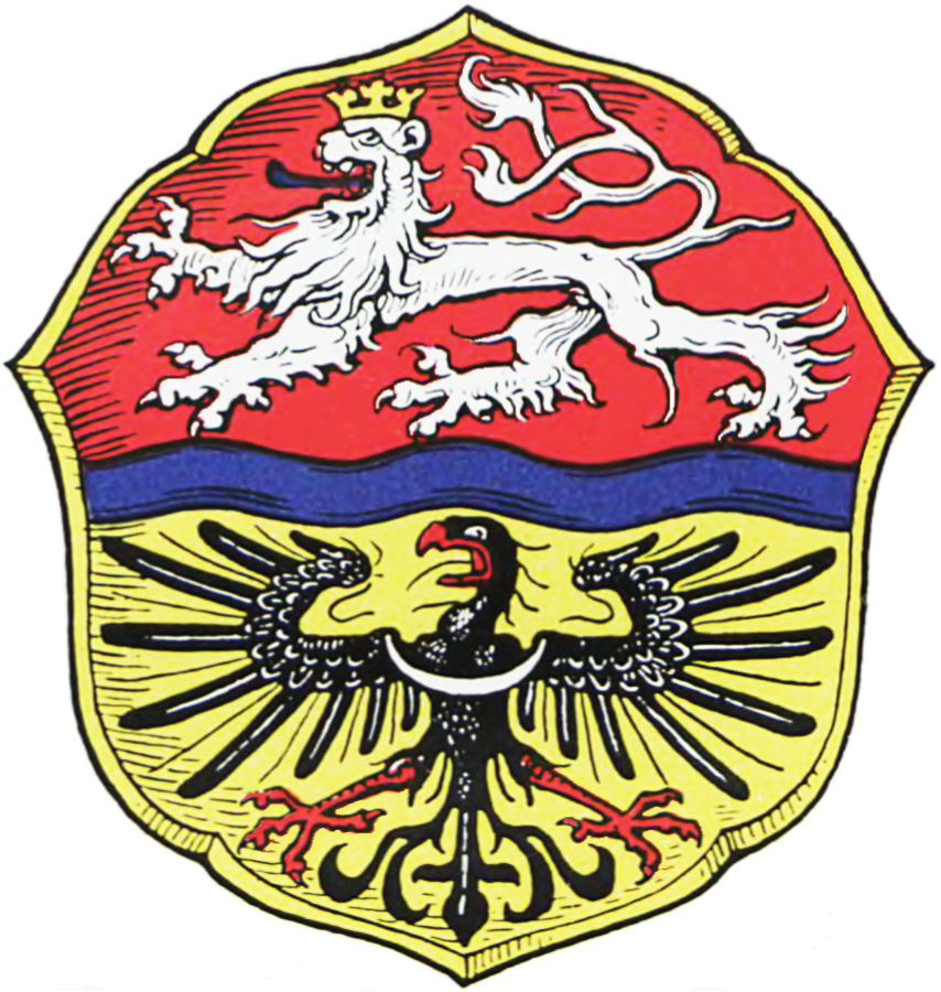 Wappen des Kreises Frankenstein, Schlesien